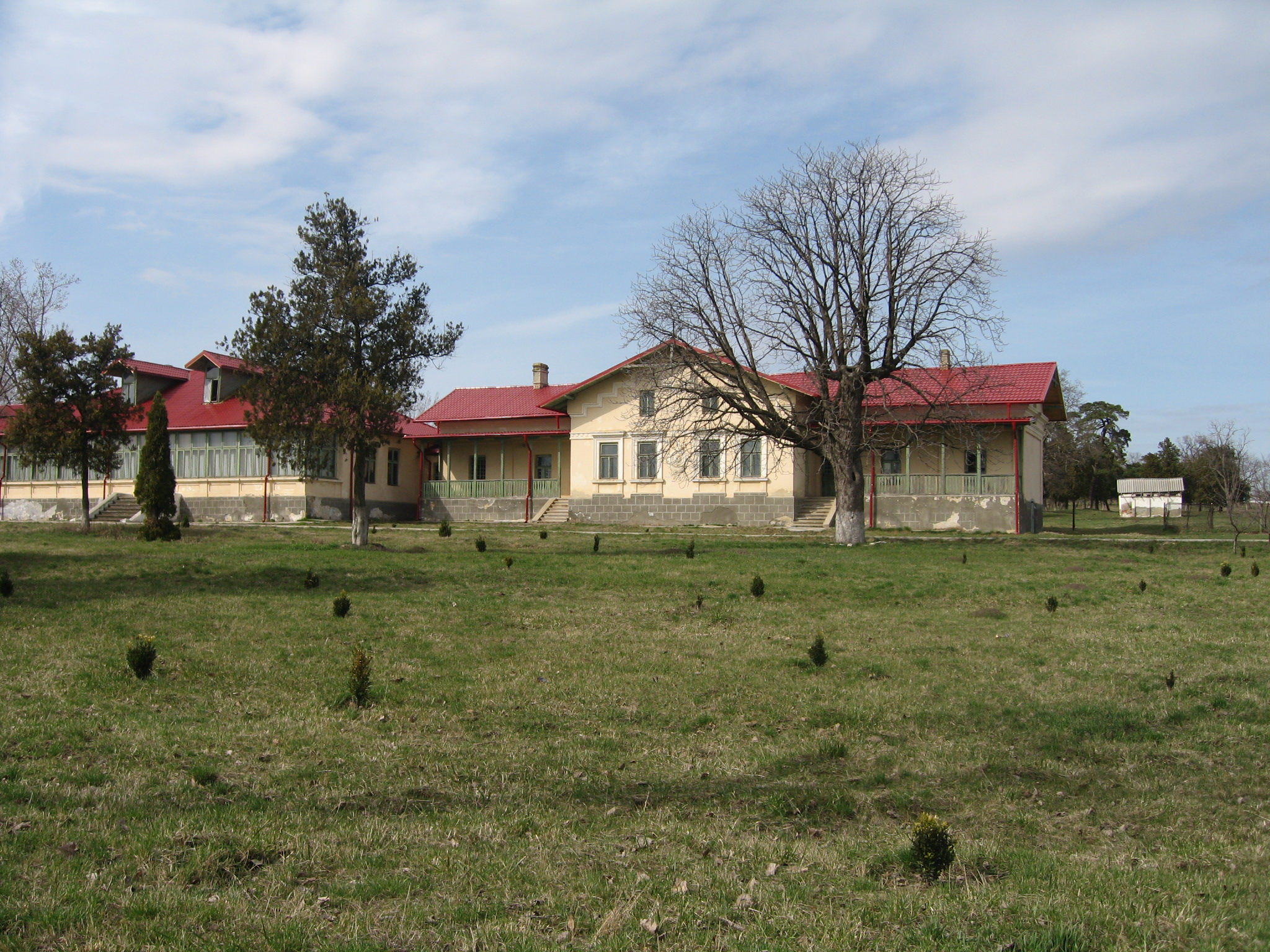 Casa memorială Emil Racoviță din Dănești